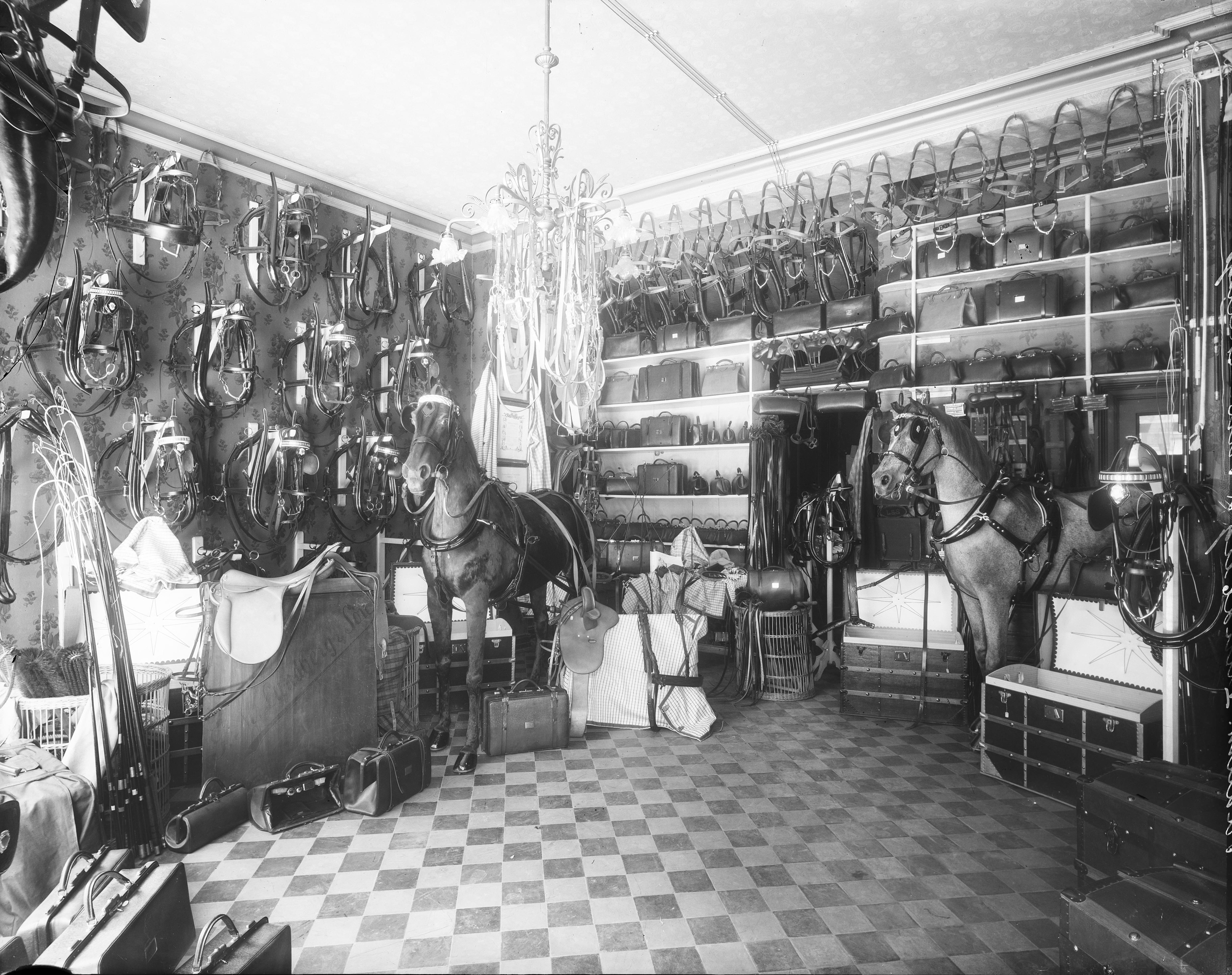 Bildet er hentet fra Nasjonalbibliotekets bildesamling. Anmerkninger til bildet var: Påskrift vedlagt ark: 290 Sadelmager Lundberg og Søn. Akersgaden. Oslo, Oslo